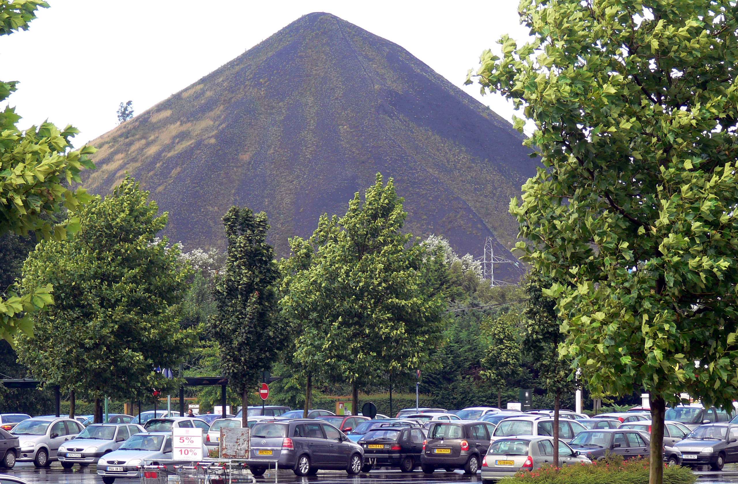 Terril n° 87 dit Lavoir Hénin Est, fosse n° 2 - 2 bis de la Compagnie des mines de Dourges et lavoir dans le bassin minier du Nord-Pas-de-Calais, Dourges, Pas-de-Calais, Nord-Pas-de-Calais, France.